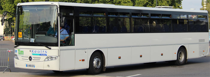 Intouro L qui fait 13 M